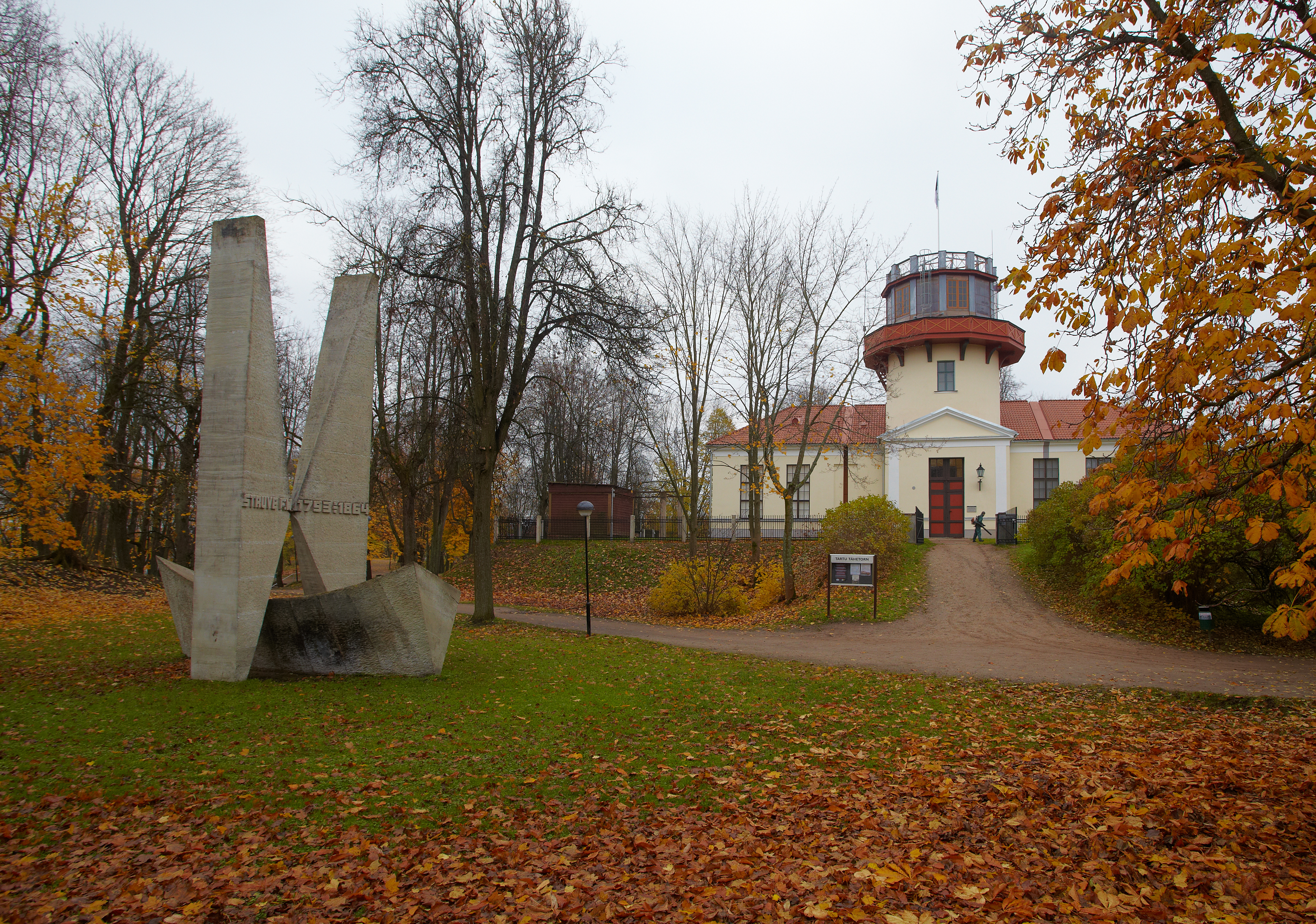 Tartu Tähetorn ja Friedrich Georg Wilhelm Struve monument 2011. aasta oktoobris.